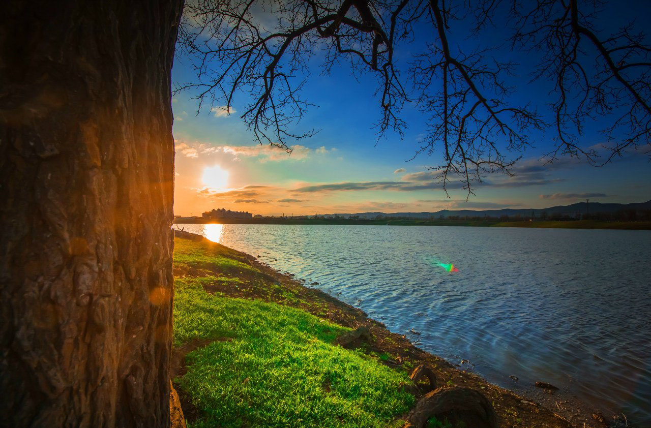 Городской пруд Сунжи (Республика Ингушетия)